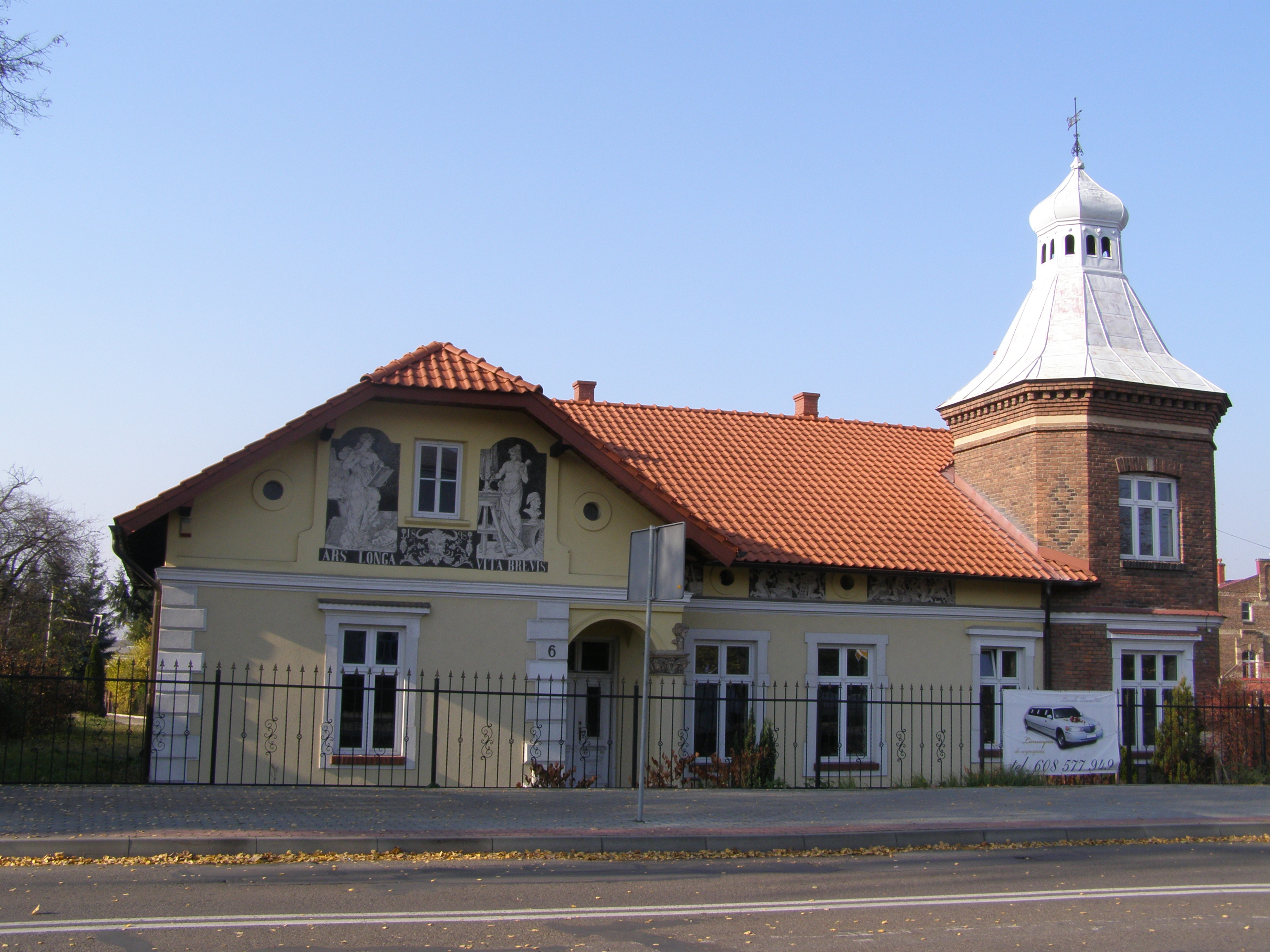 Dom art.rzeźbiarza Andrzeja Lenika w Krośnie